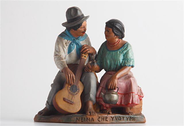 Escultura de Serafin Marsal, artista catalão que viveu no Paraguai.